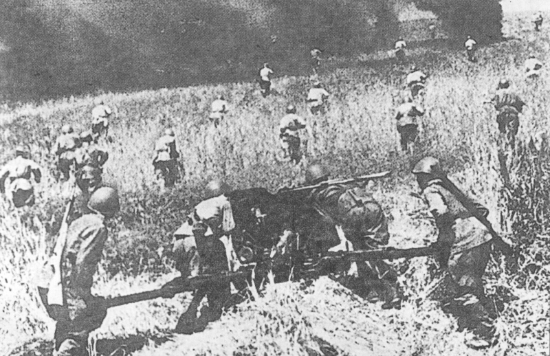 Protiútok sovětské střelecké jednotky v bitvě u Kurska.